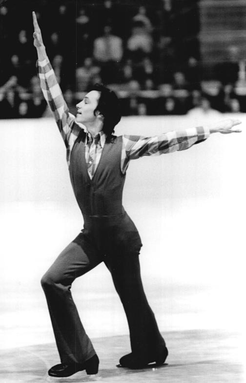 Jan Hoffmann ADN-ZB Mittelstädt 24.3.74 Berlin: Eiskunstlauf-Weltklasse gefeiert. Großartiges Können demonstrierte auch Jan Hoffmann, der sich erstmals auf der achten Station der ausgedehnten ISU-Schaulauftournee auch den Zuschauern in der DDR als Europa- und Weltmeister vorstellte. 21 Läuferinnen und Läufer aus Großbritannien, den Niederlanden, der BRD, den USA, Kanada und der DDR begeisterten die Eissportanhänger in der seit Tagen ausverkauften Eishalle des Sportforums.